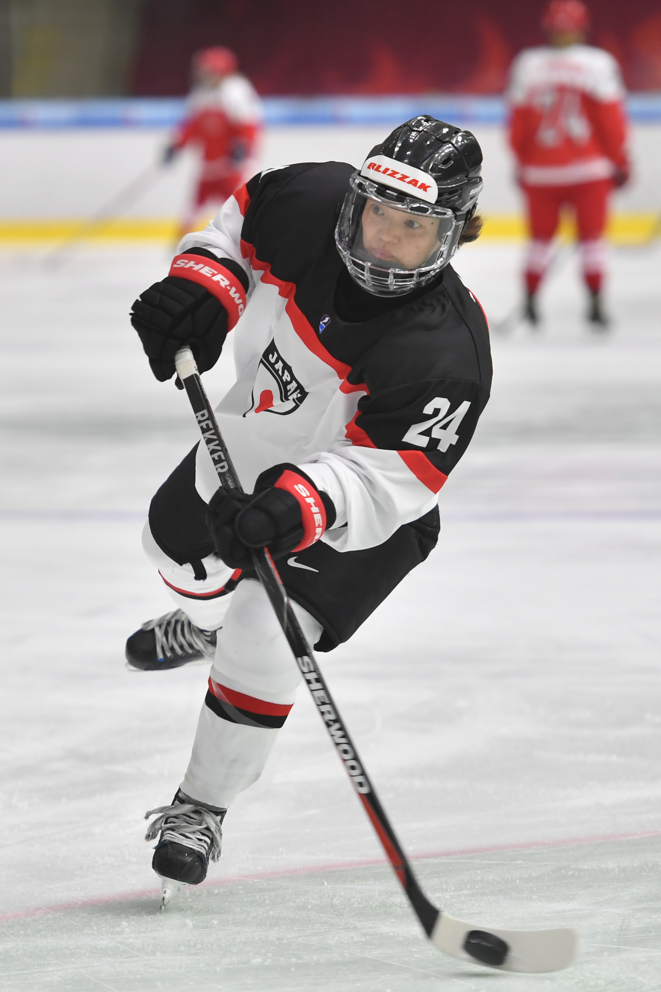 IIHF Eishockey Damen Weltmeisterschaft Division IA am 16. April 2017 in Graz.Bild zeigt Shoko ONO (JPN).